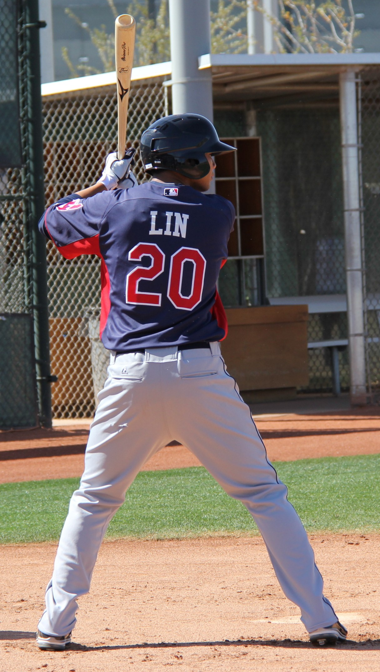 林家慶效力於克里夫蘭印地安人隊時期。